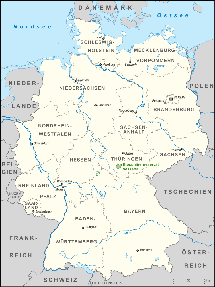 Karte des Biosphärenreservates Vessertal in Deutschland